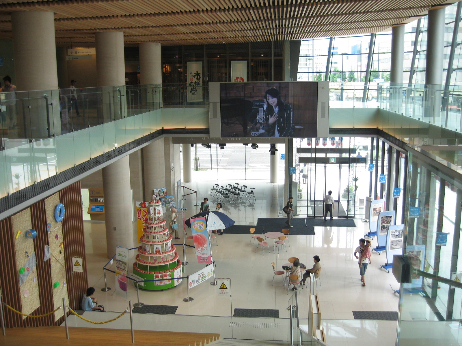 新潟市中央区。新潟日報メディアシップのエントランス付近。